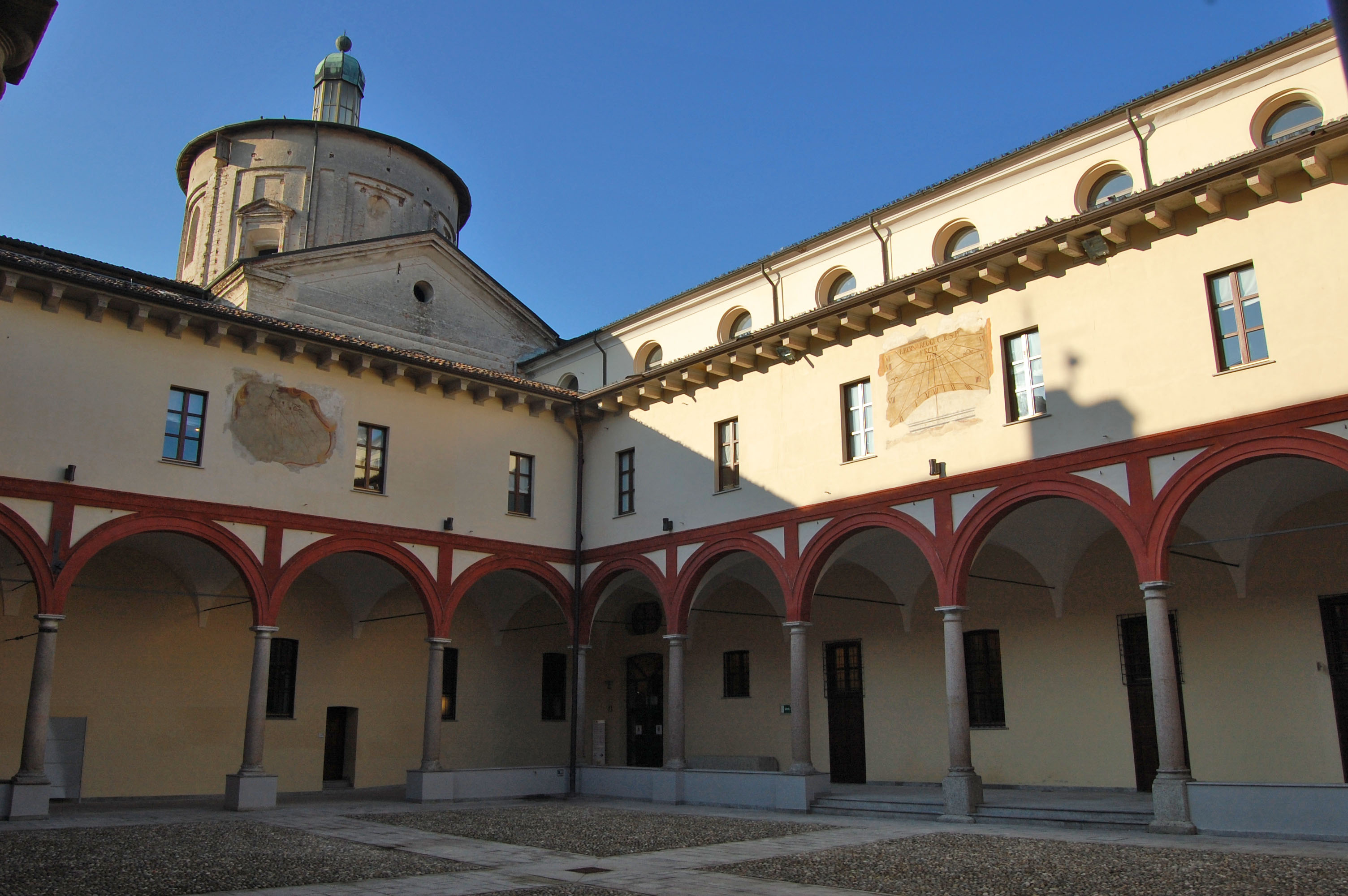 Cortile interno del palazzo San Cristoforo, a Lodi. Sullo sfondo la cupola della chiesa (sconsacrata) di San Cristoforo